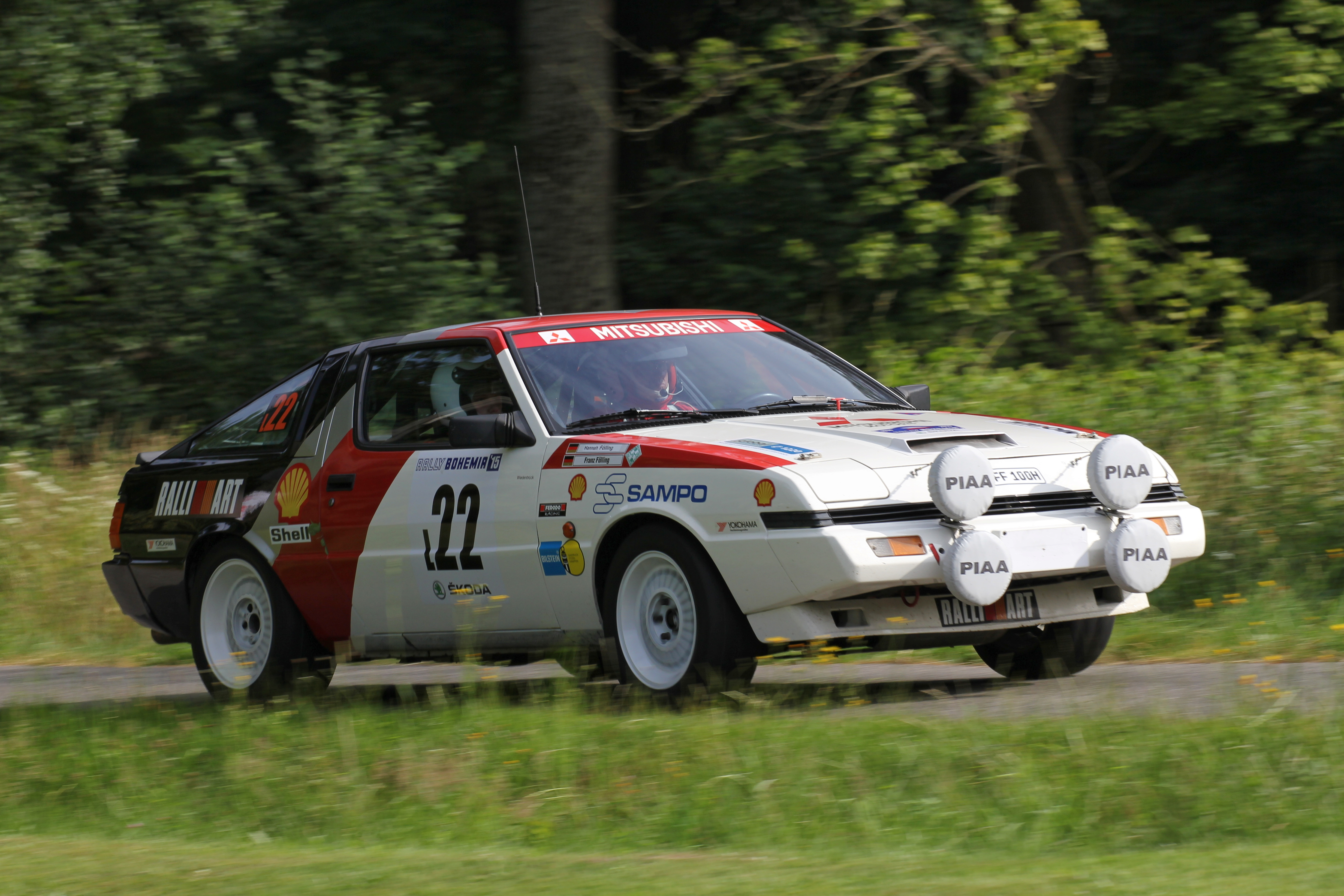 Rally Bohemia - Rally Legend